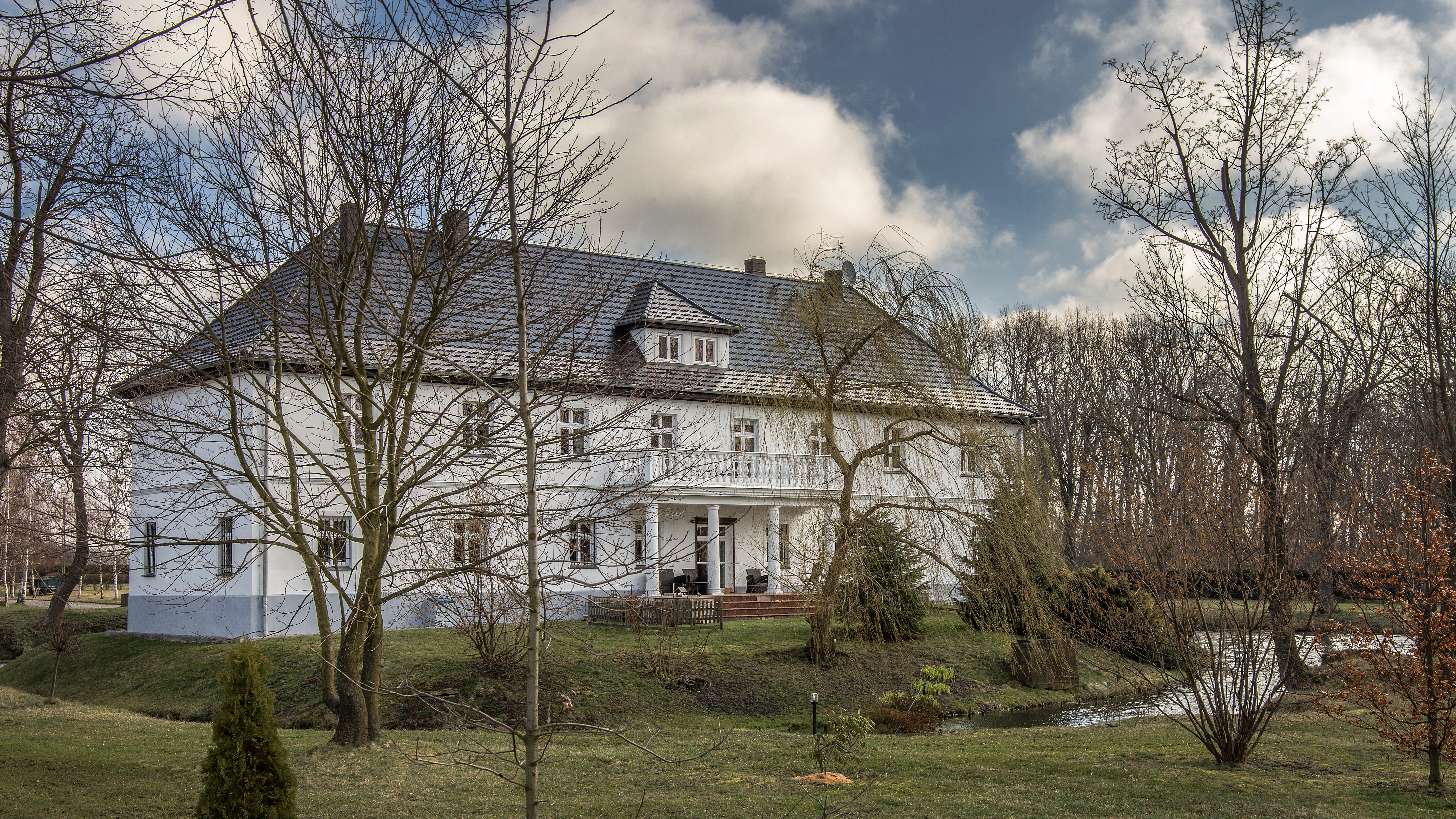 Lisowice 14, dwór, 2 poł. XVI, pocz. XIX